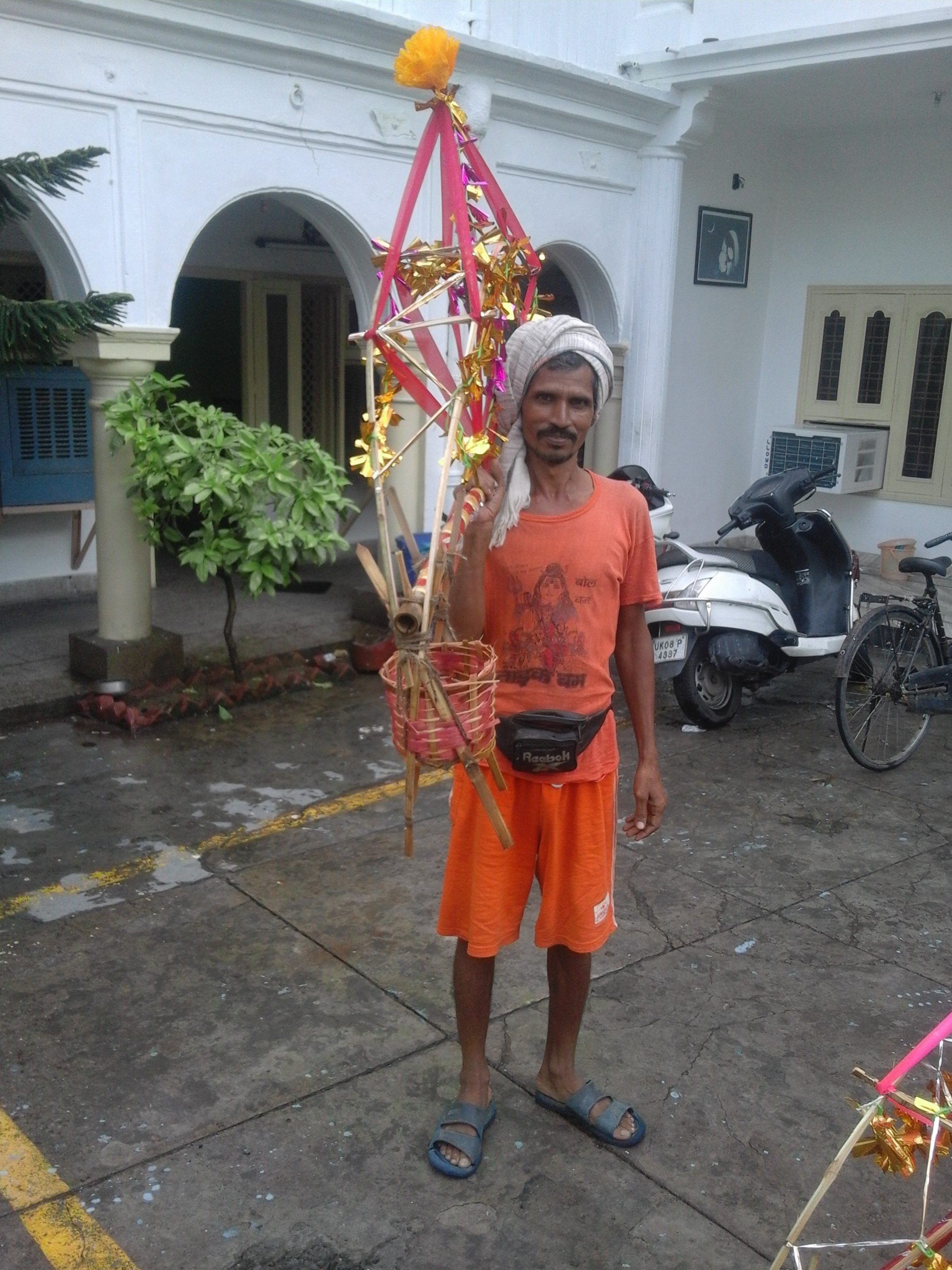 हरिद्वार में कांवड उठाता भोला नेपाली: हरिद्वारमा कांवड उठायको भोले